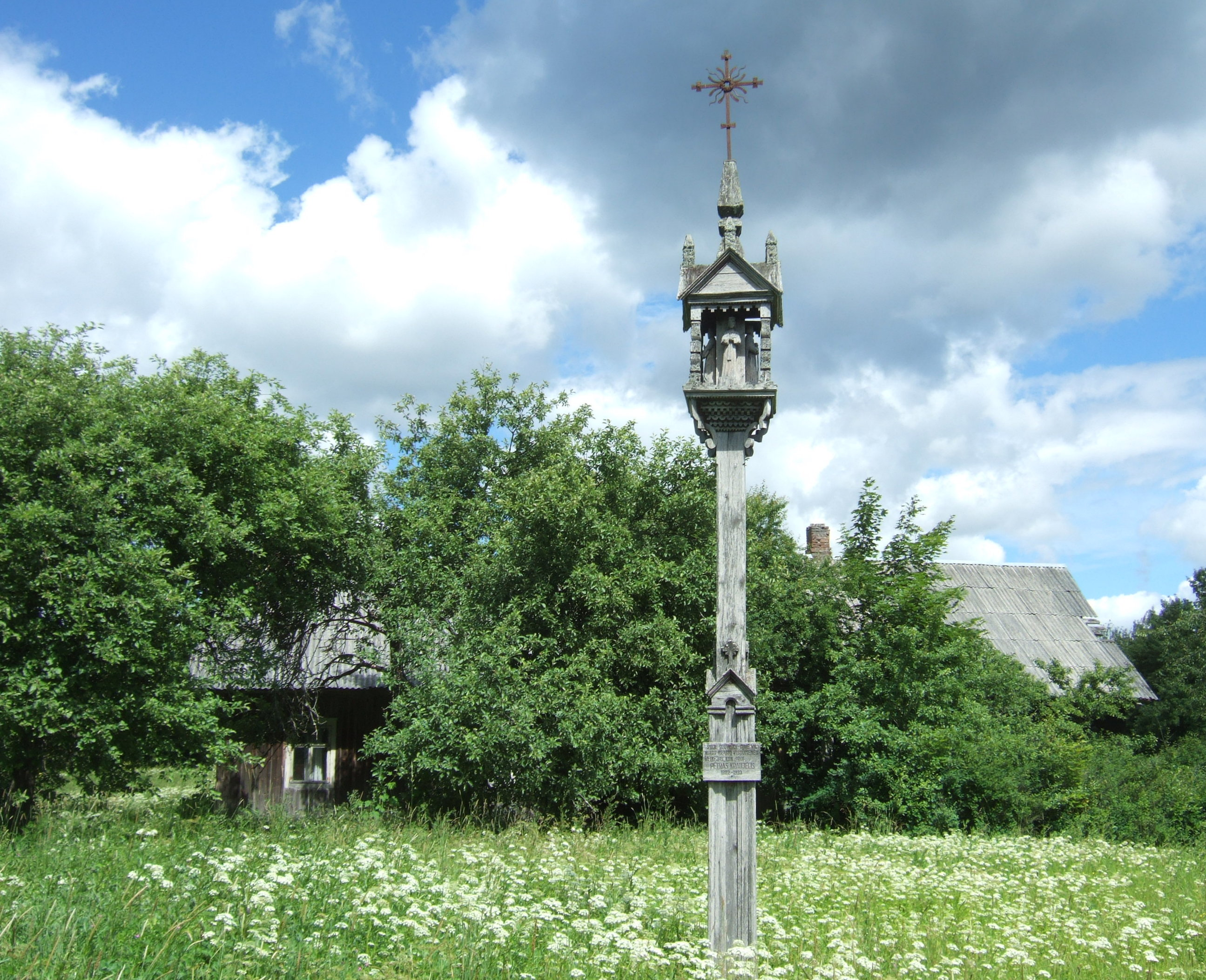 Žagarų kaimas (Molėtai), koplytstulpis kunigui P. Kraujaliui